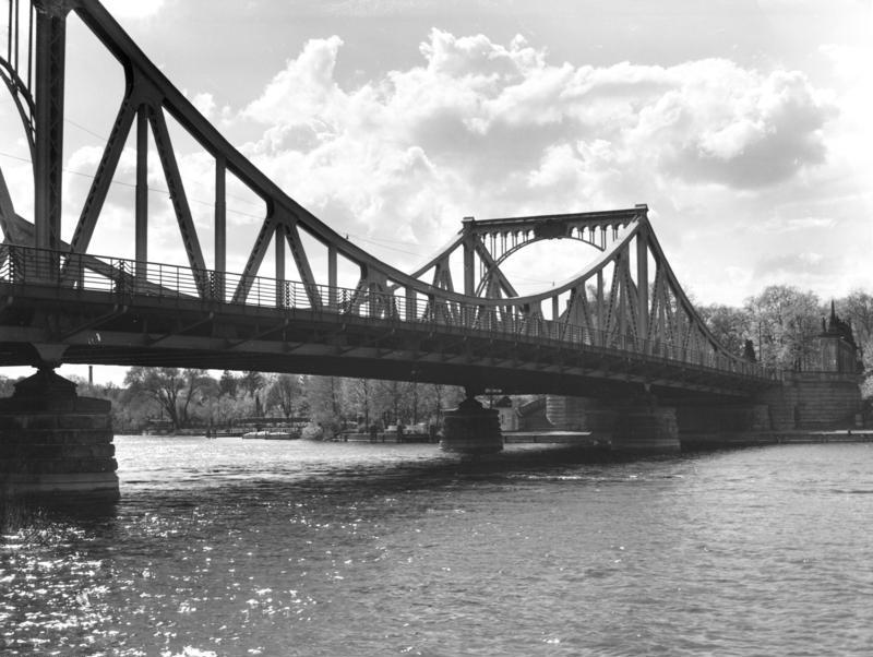 Potsdam.- Glienickerbrücke